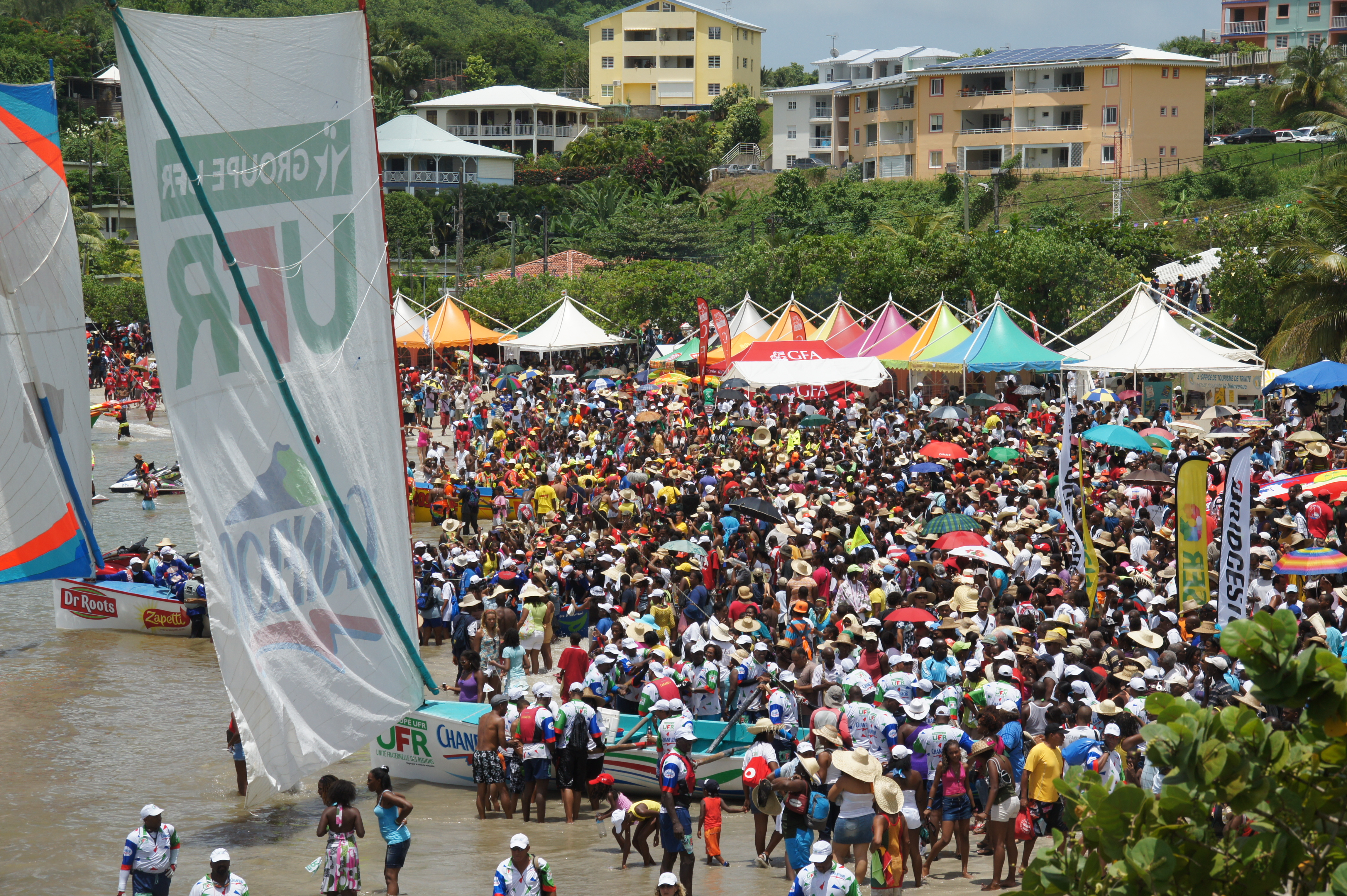 Arrivée des yoles sur la plage lors du Tour de la Martinique des yoles de 2011